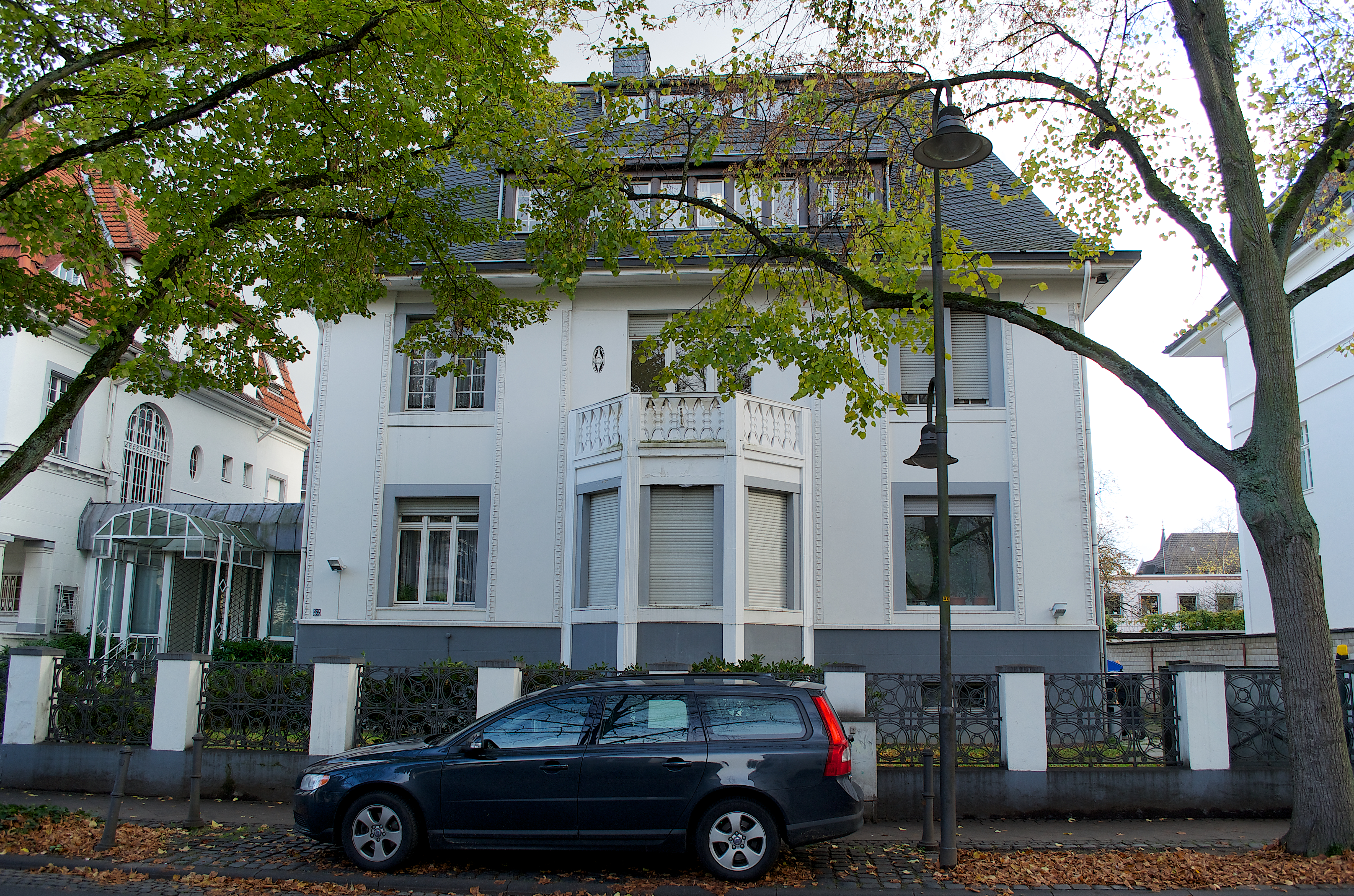 Denkmalgeschütztes Wohnhaus Rheinallee 32 (ehem. Botschaft und bis Ende 2013 Generalkonsulat von Algerien) in Bad Godesberg, Ortsteil Godesberg-Villenviertel